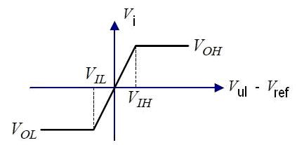 (Ja sam autor ove slike, koristim je za seminarski rad i predajem je u javno vlasništvo)